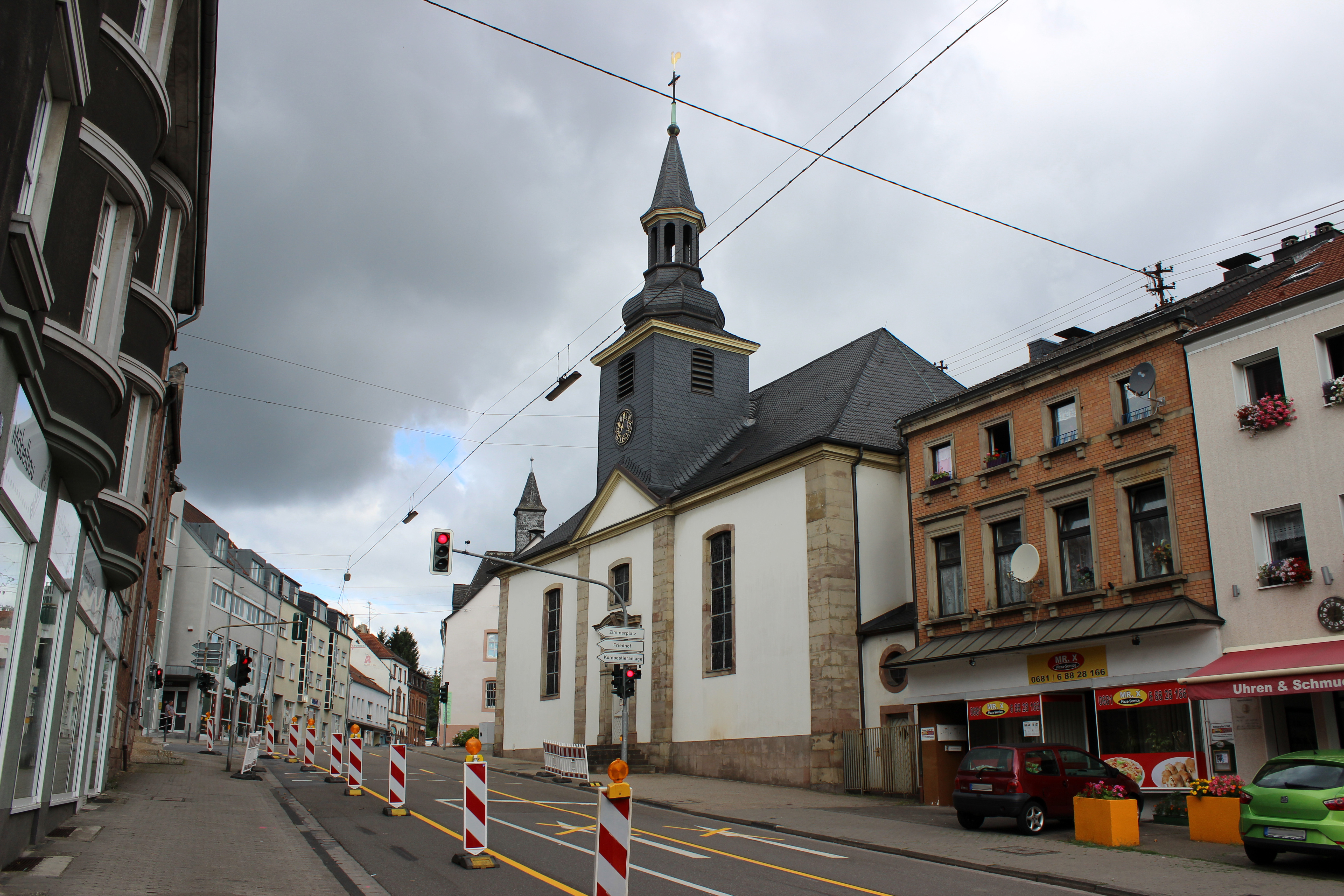 Die evangelische Kirche in Gersweiler, einem Stadtteil der saarländischen Landeshauptstadt Saarbrücken